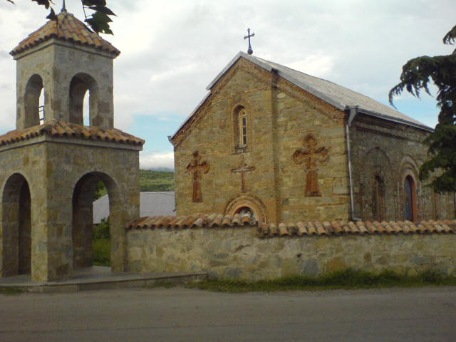 ღვთისმშობლის სახელობის ეკლესია, სოფ. ნორიო, გარდაბნის მუნიციპალიტეტი